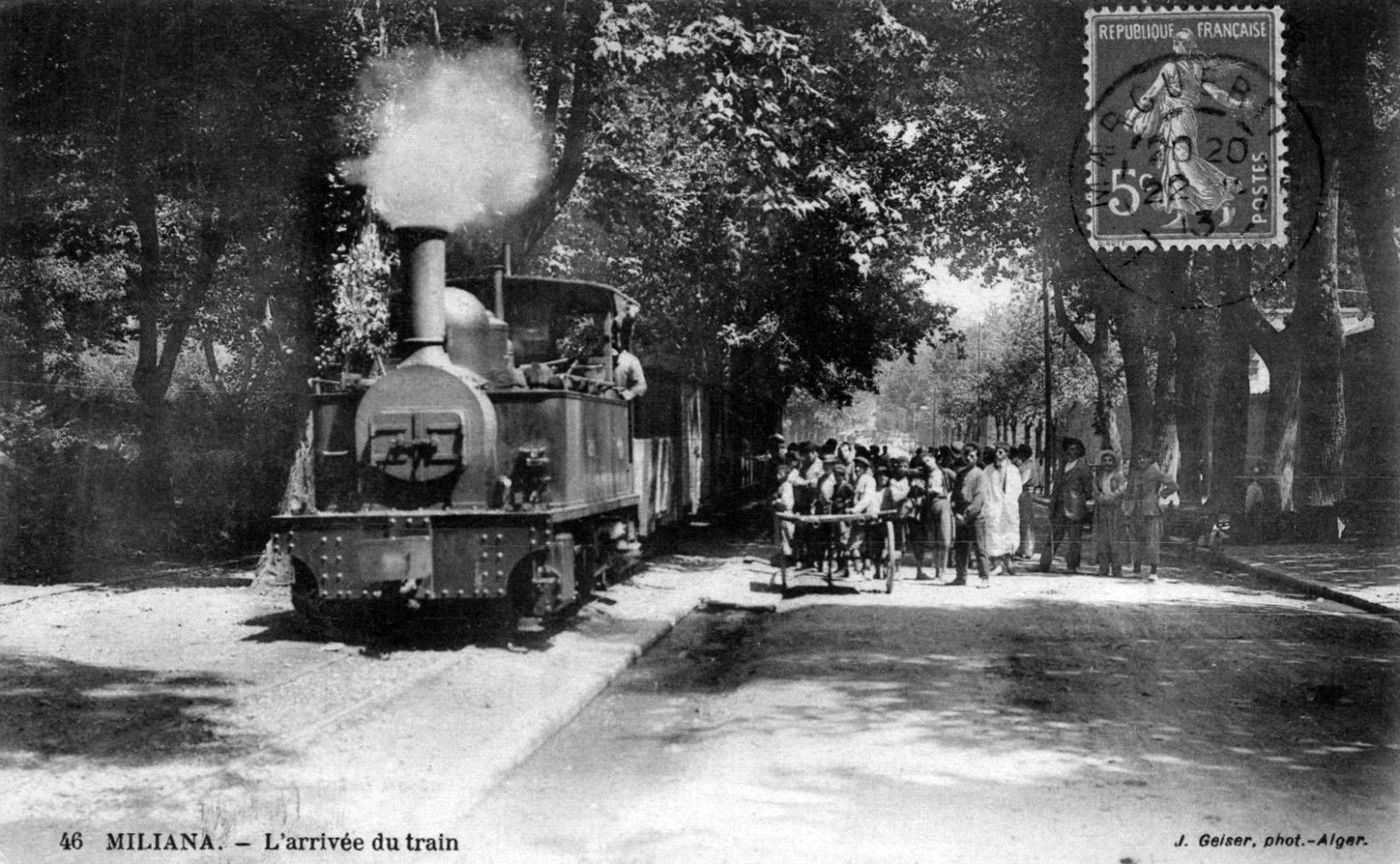 750mm gauge, Miliana, Algeria